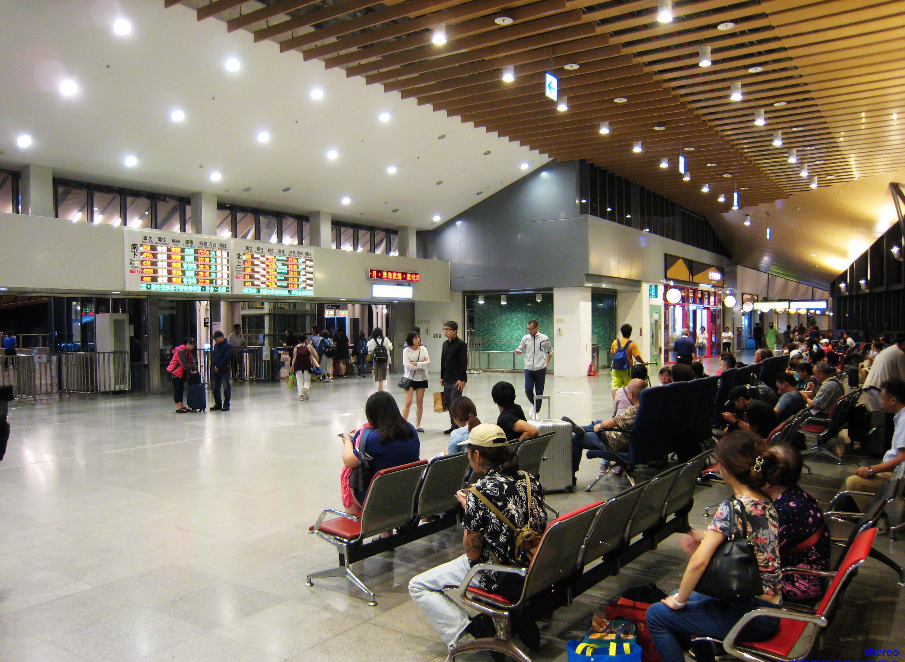 108年10月花蓮車站3樓剪票口及候車大廳